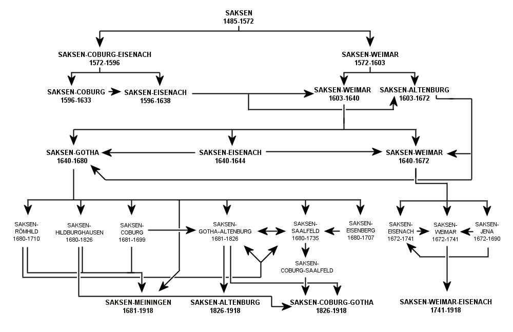 Grafiek van de indeling en opdeling der Ernestijnse hertogdommen, zelf gemaakt